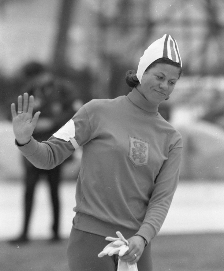 Ans Schut. Olympische Winterspelen te Grenoble. Ans Schut rijdt uit na haar rit op de 3000 meter, waarin zij een Olympisch record vestigde.